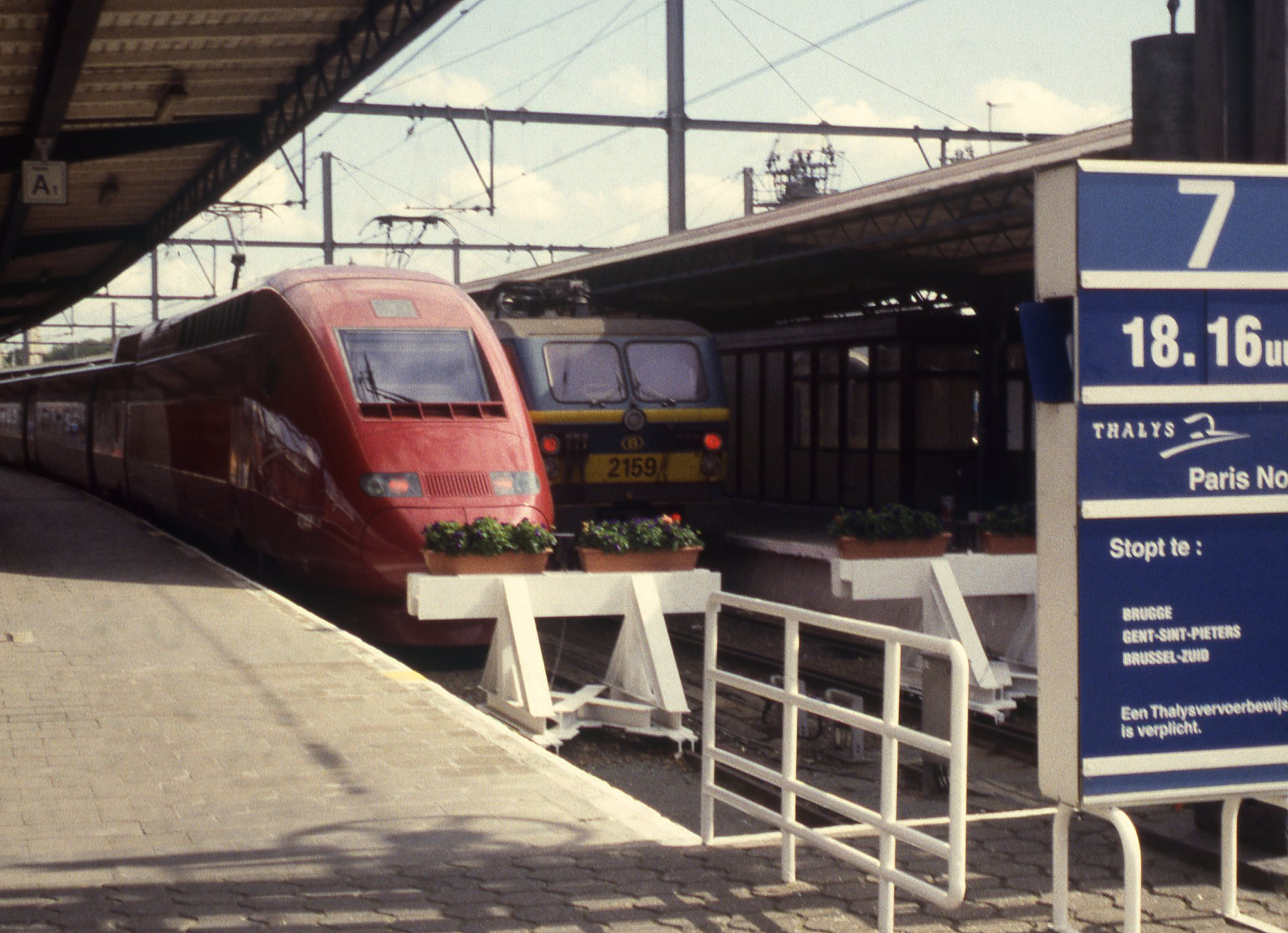 De Thalys in Oostende